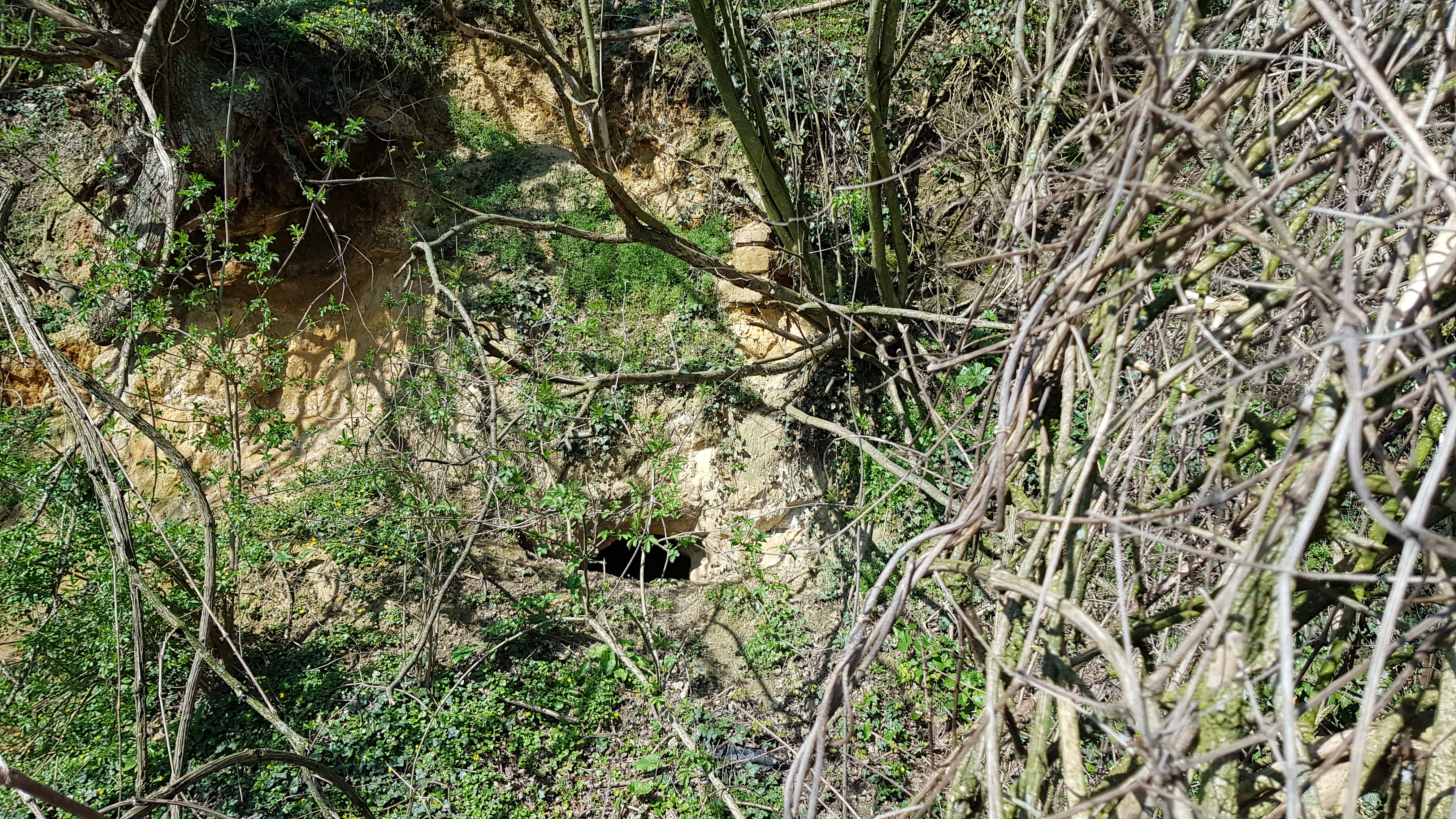 Sint-Josephgroeve, Valkenburg aan de Gulp, Nederland